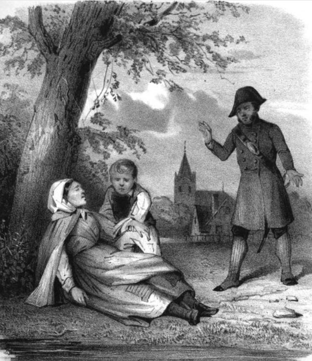 Afbeelding op de titelpagina van "De Vagebond" door Douwe Petrus van Steenwijk (1784-1867)